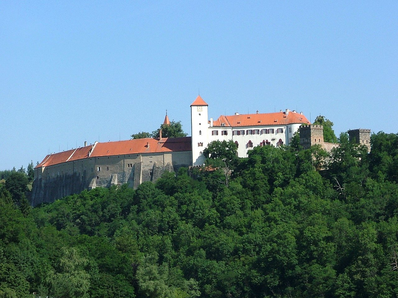 Hrad Bítov (okres Znojmo)